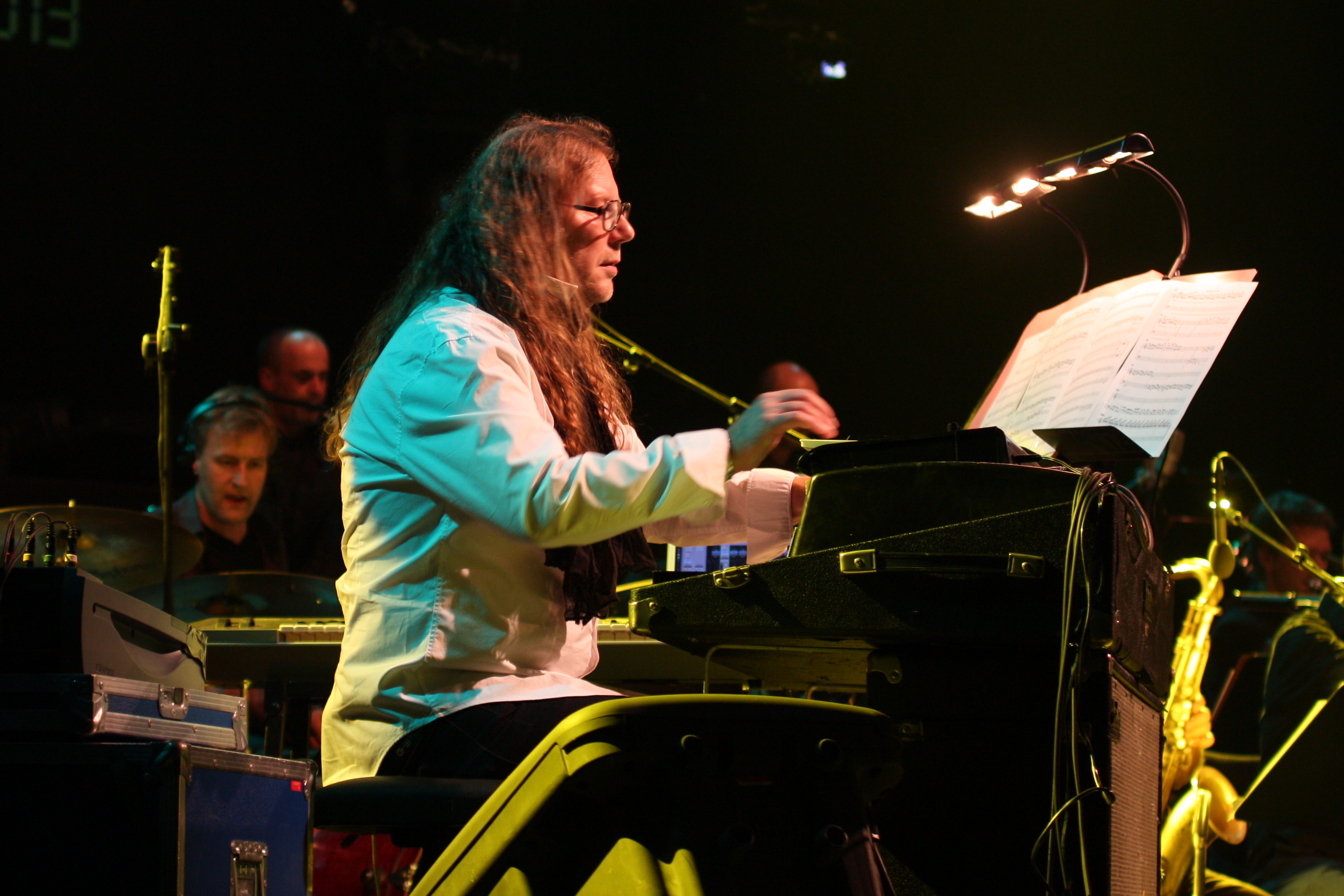 44. Deutsches Jazzfestival Frankfurt 2013: Vladyslav Sendecki von der hr-Bigband